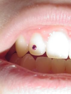 Hammaskoru